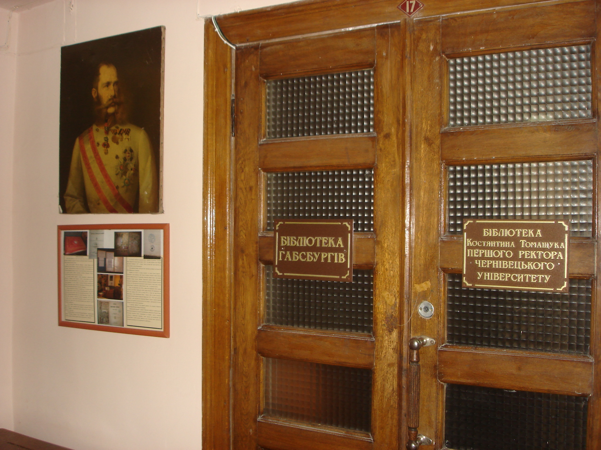 Бібліотека_університету_-_10.jpg: іменні бібліотеки